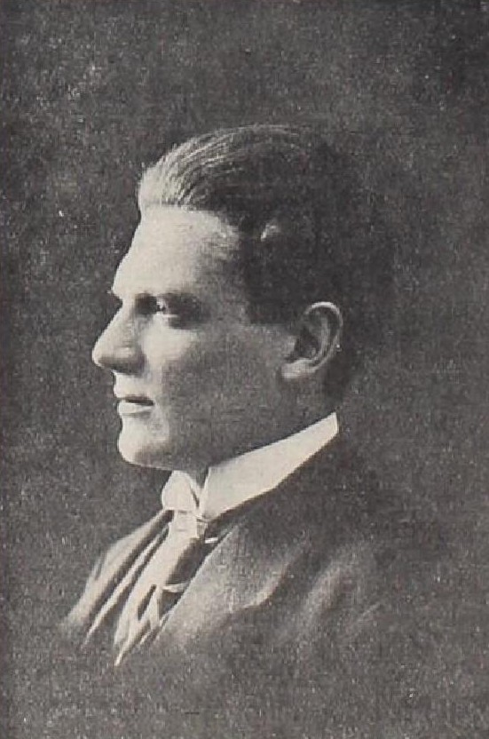 Drahoš Želenský (1896-1959), český divadelní herec a režisér